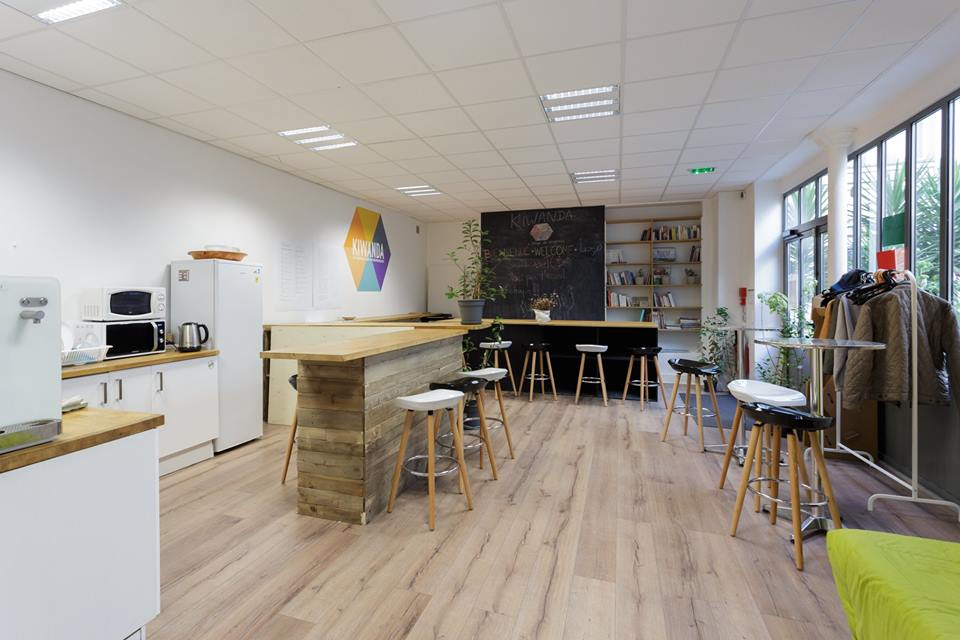 L'espace de partage du rez-de-chaussée de Kiwanda